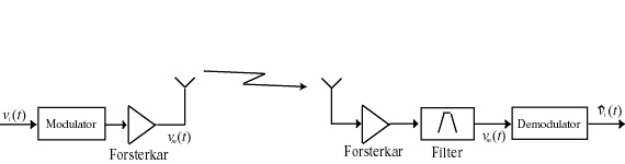 Blokkdiagram for raidisamband